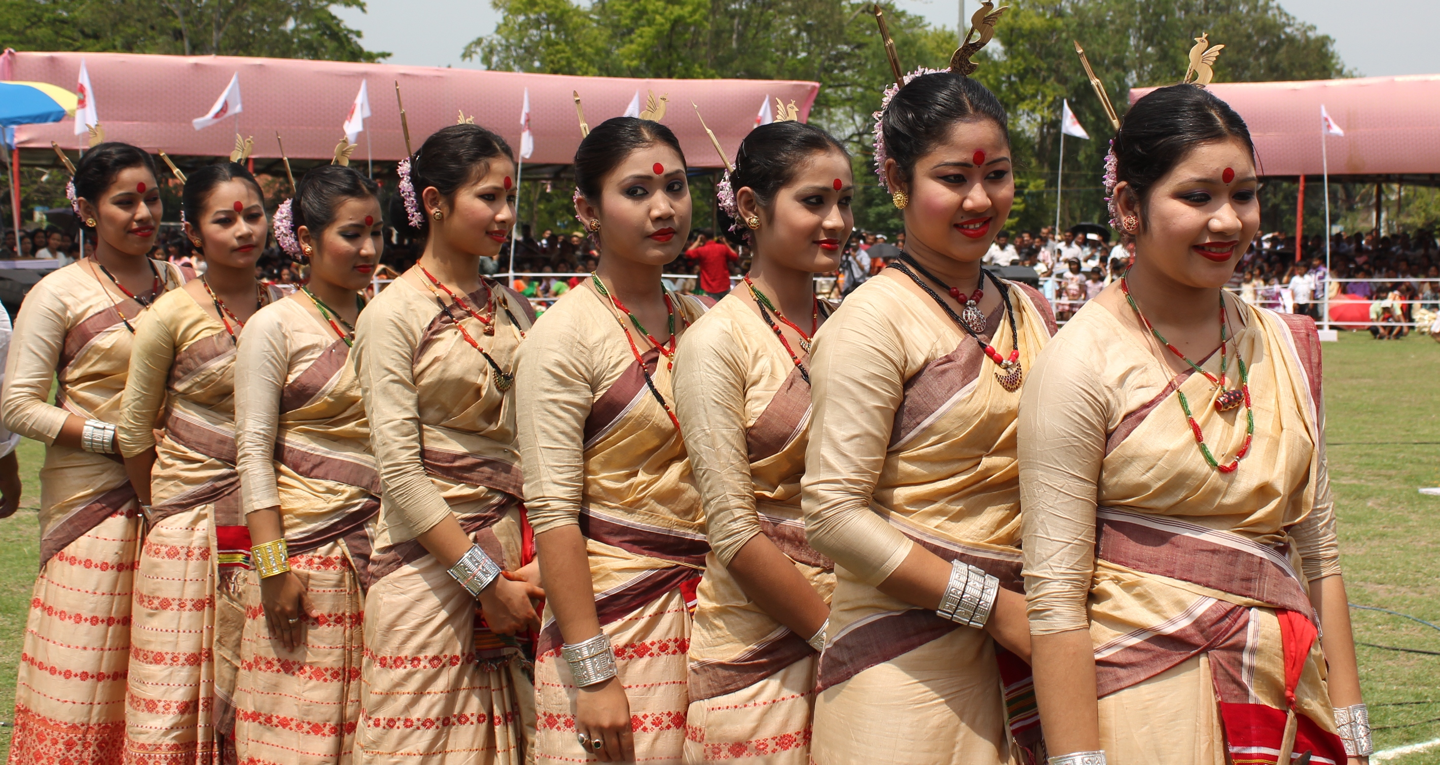 অসমীয়া: সদৌ গুৱাহাটী ছাত্র সংস্থাৰ দ্বাৰা গুৱাহাটীৰ জাজেচ খেলপথাৰত আয়োজিত মুকুলি বিহু(১৩-০৪-২০১২)ৰ এটি দৃশ্য।